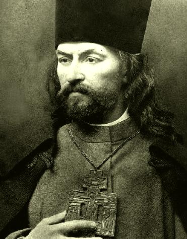 Русский священник, политический деятель Георгий Аполлонович Гапон (1870-1906). Портрет работы неизвестного художника.